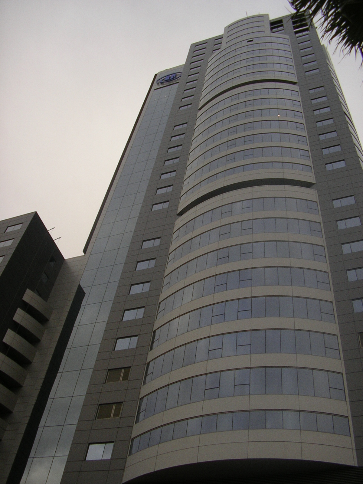 Hotel Hilton de València (Espanya).